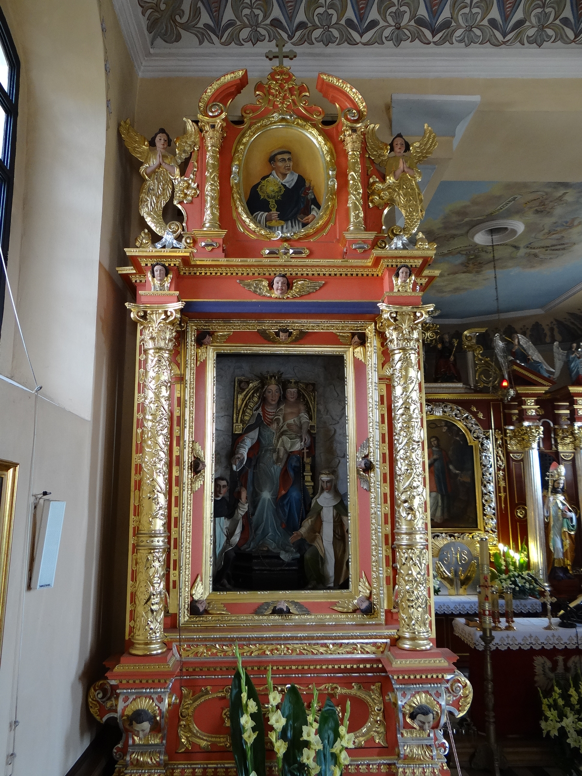 Radziszów, zespół kościoła par. pw. śś. Wawrzyńca i Małgorzaty, XV, XIX